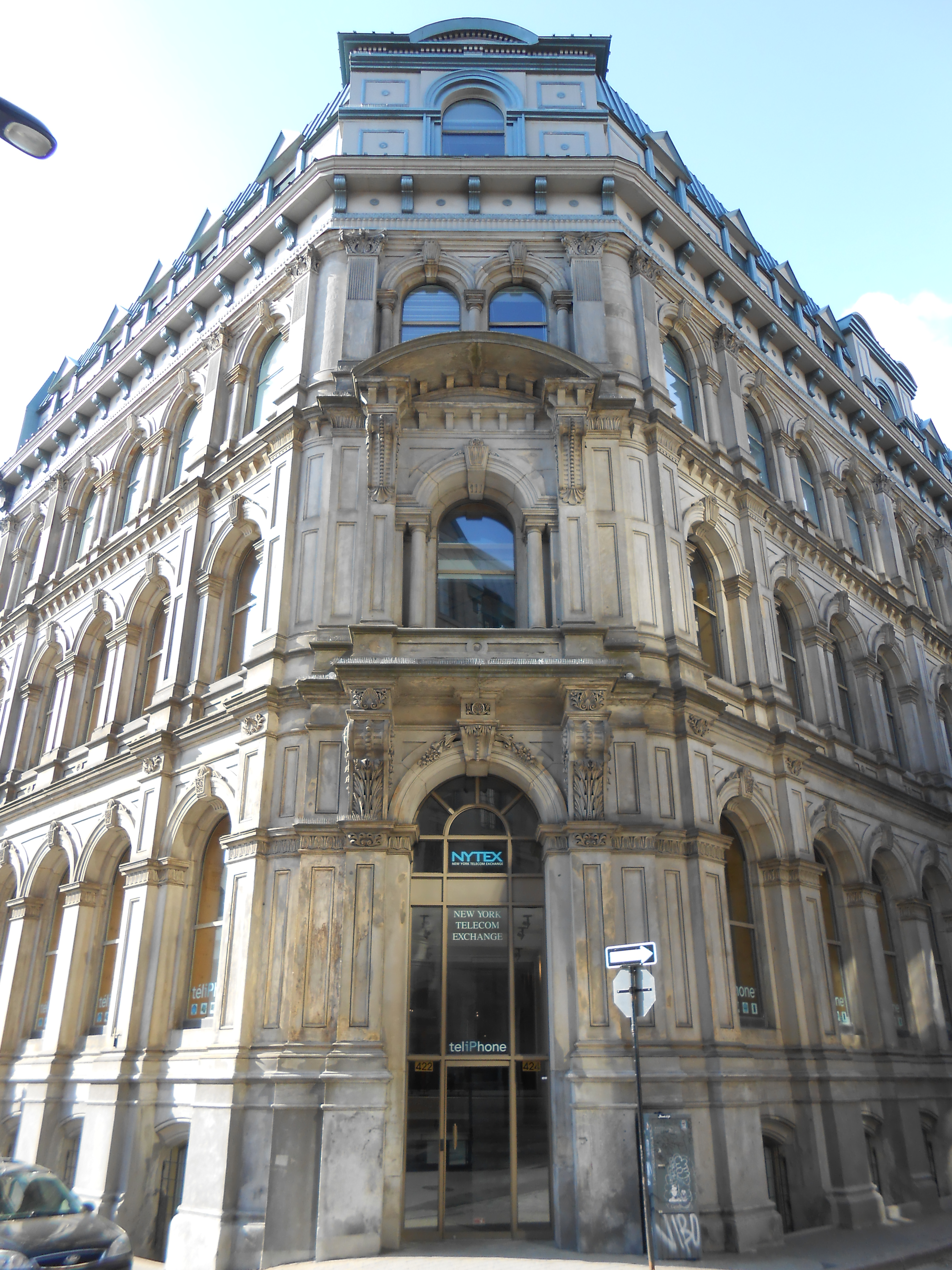 Édifice de la Montreal Telegraph, 422-424, rue Saint-François-Xavier, 204, rue du Saint-Sacrement (façade latérale), Montréal